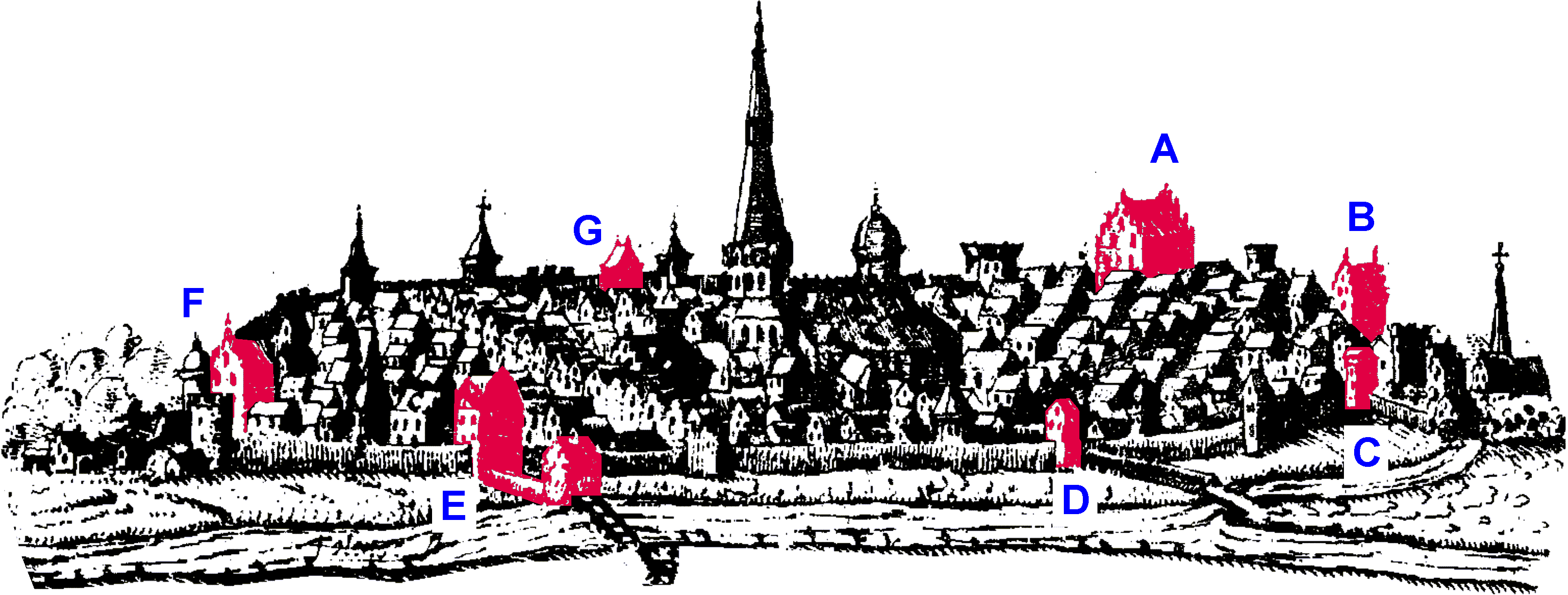 Lage der Stadttore Demmins um 1617 A: Kuhtor (Luisentor)B: Frauentor C: Fischerpforte D: Schlosstor (Neues Tor) E: Kahldentor F: Holstentor G: Mentzerpforte